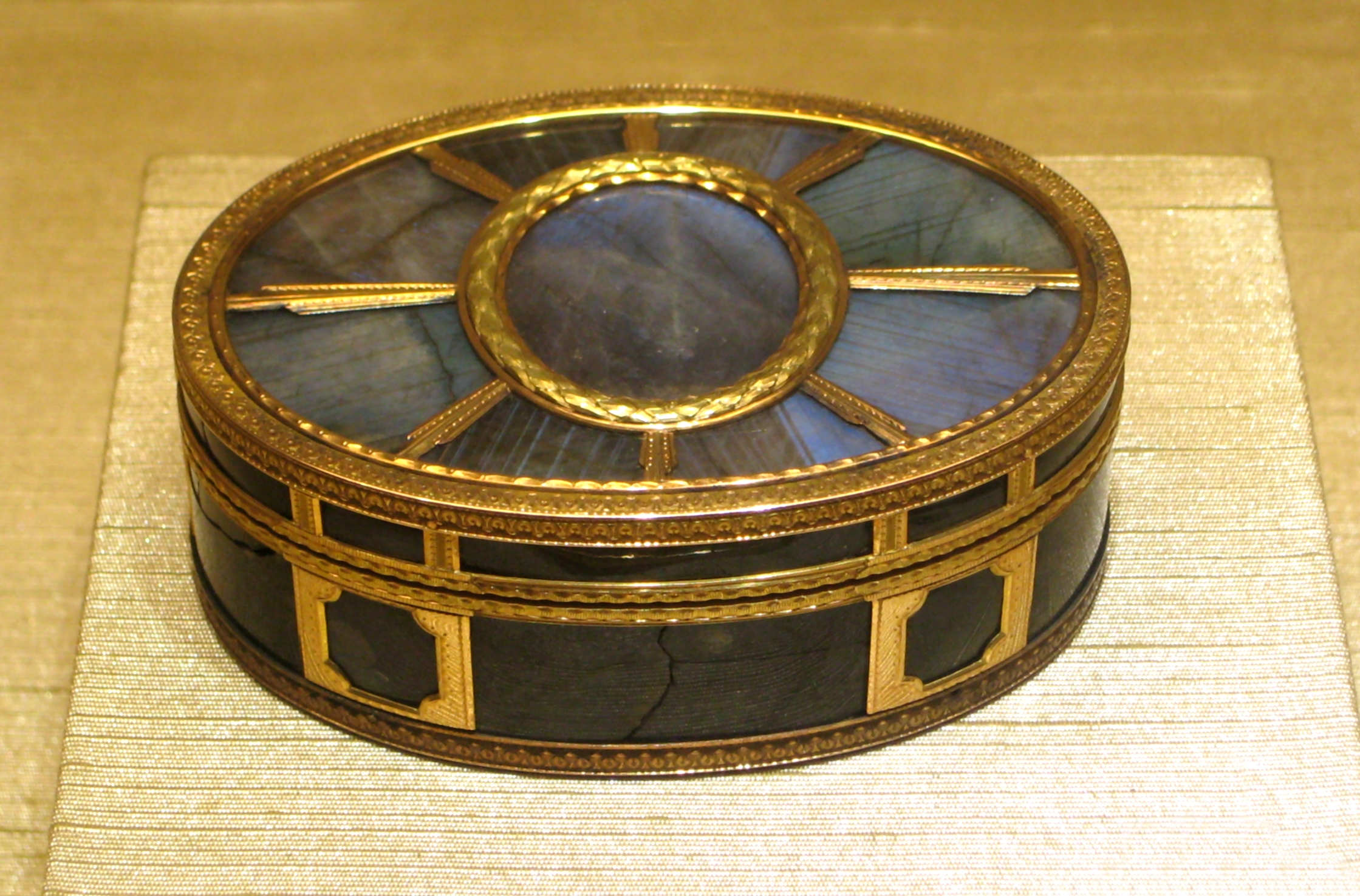 Табакерка. СПб, 1792. Мастер И. Кайзер. Лабрадорит, золото. Эрмитаж.